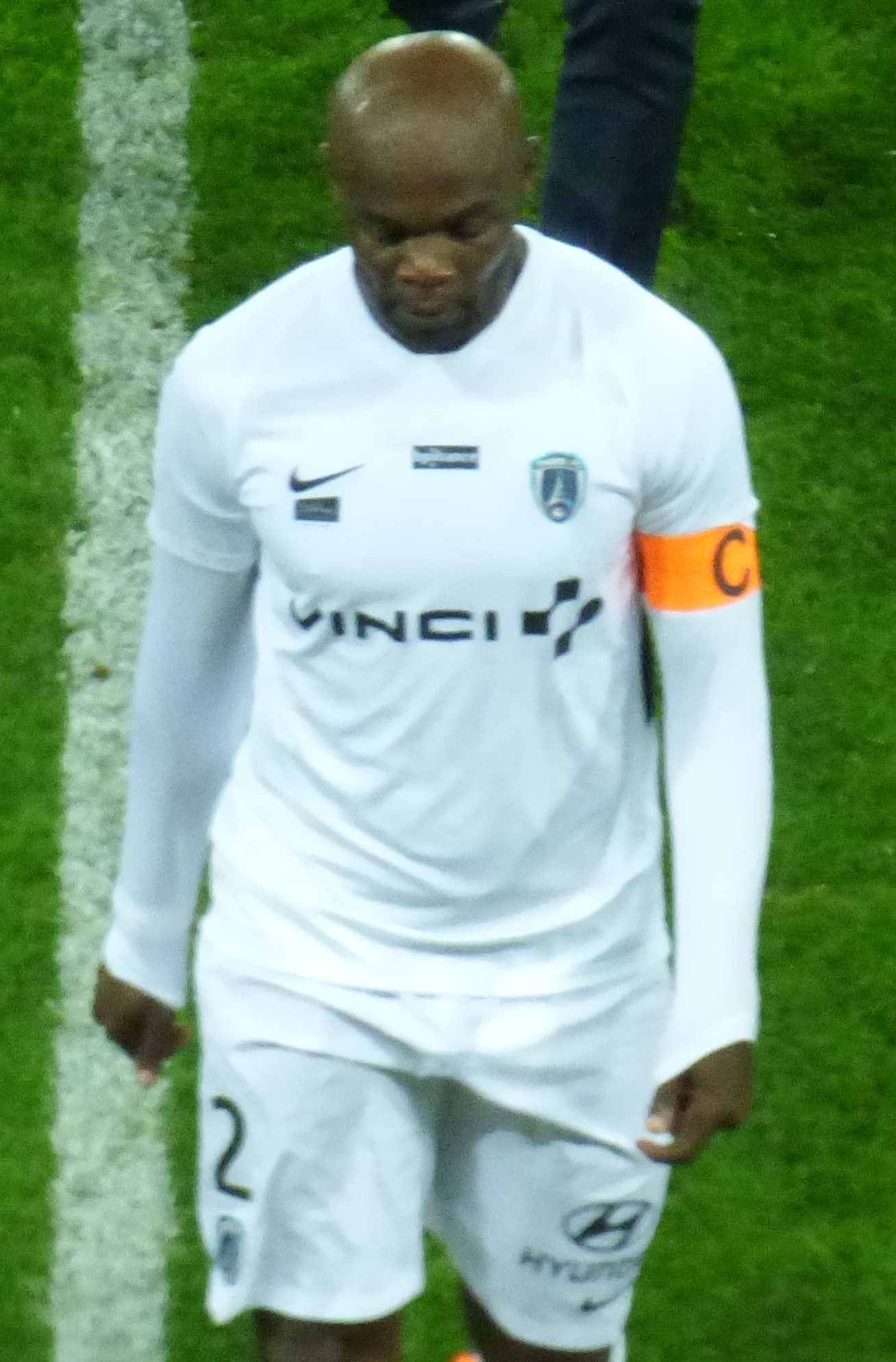 Frédéric Bong pendant le match Lens / Paris, comptant pour la neuvième journée du championnat de France de football de Ligue 2, le 28 septembre 2018.